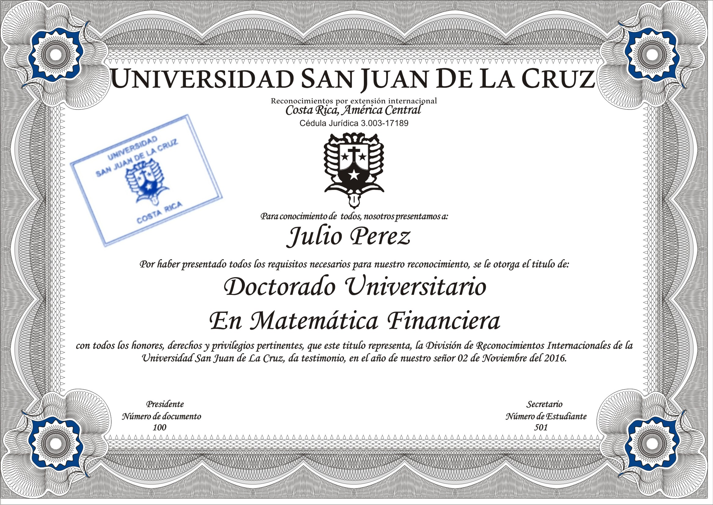 SJDLC Titulo Propio